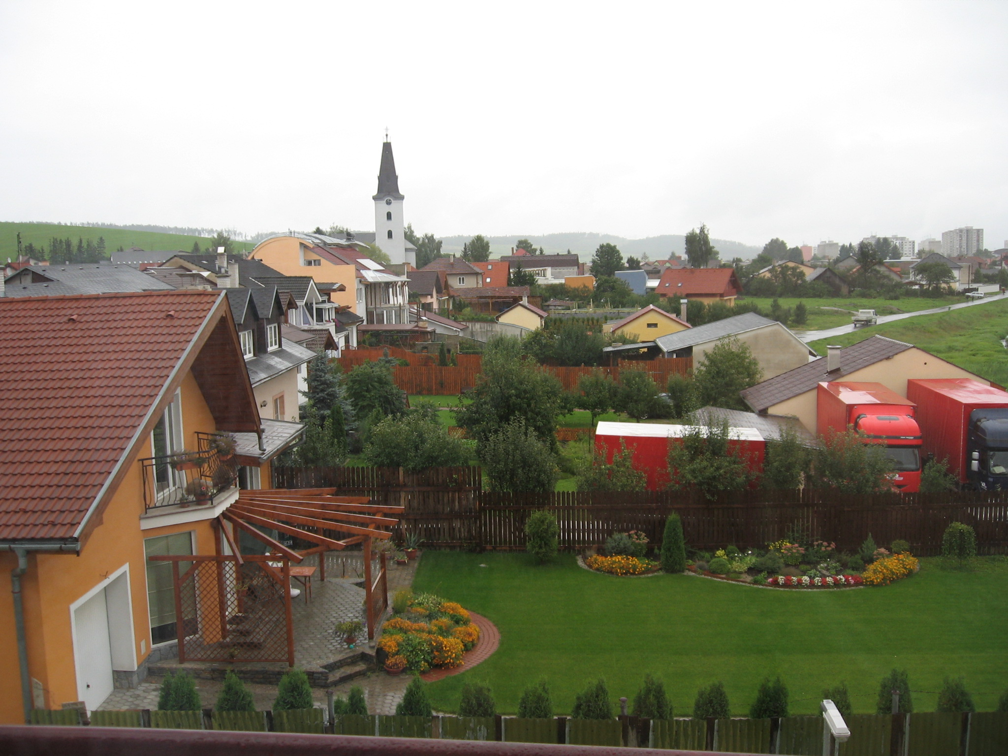 Smižany